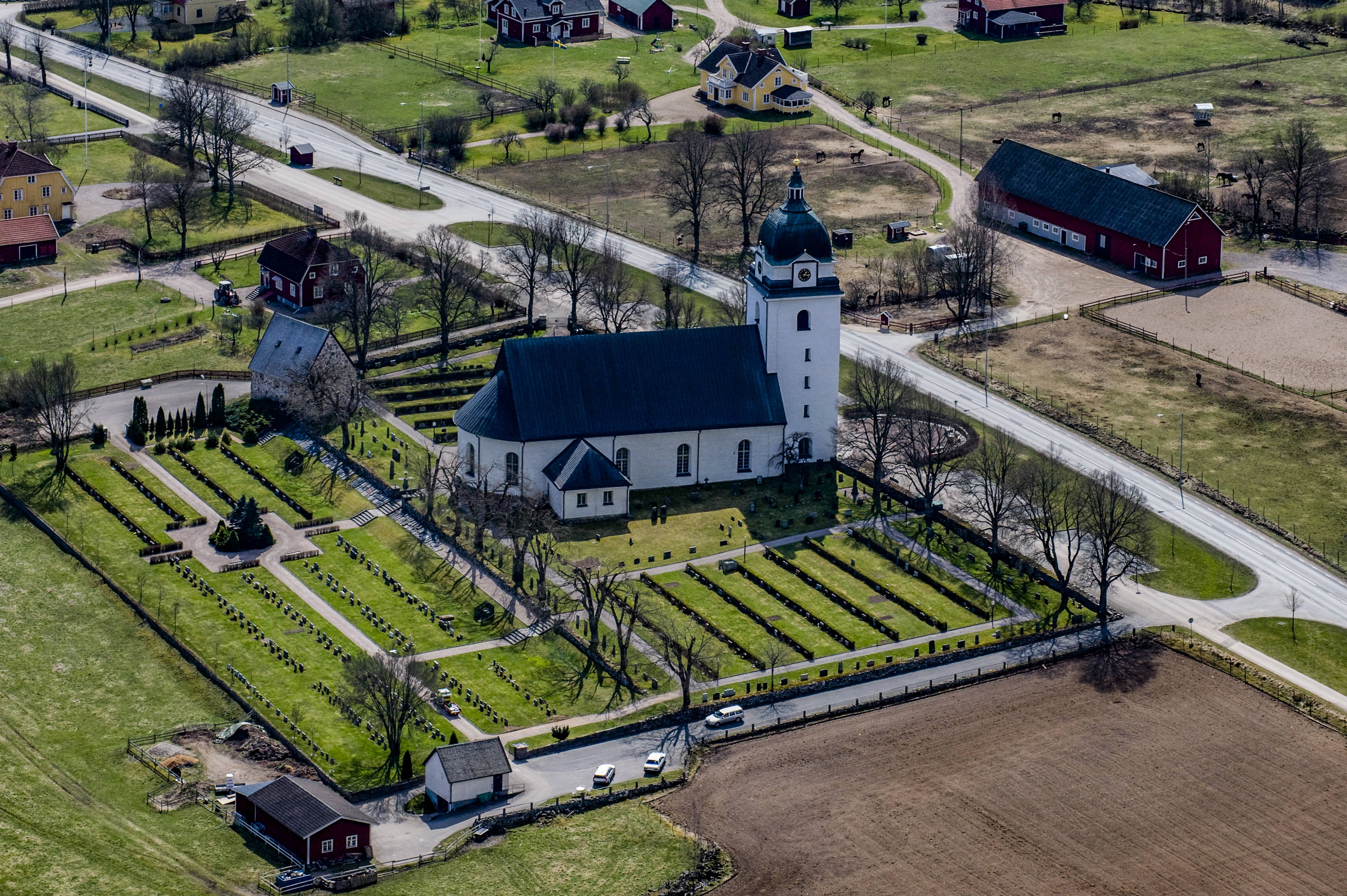 Alseda ka